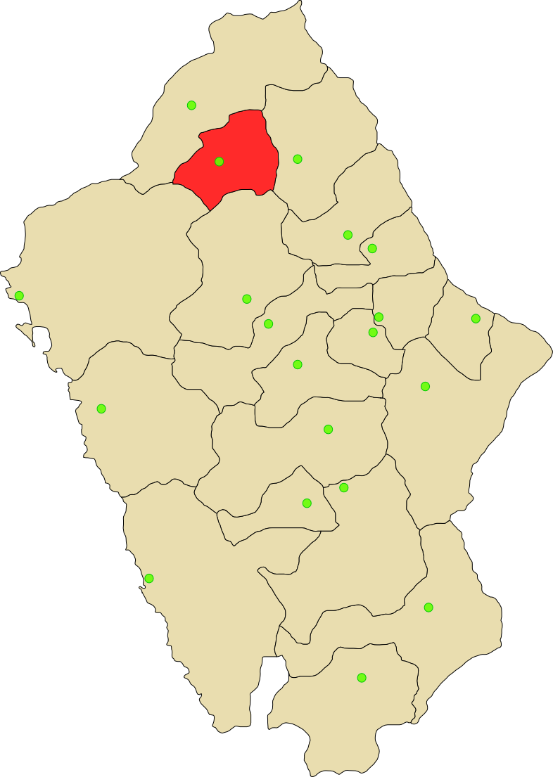 Provincia de Corongo de departamento Ancash